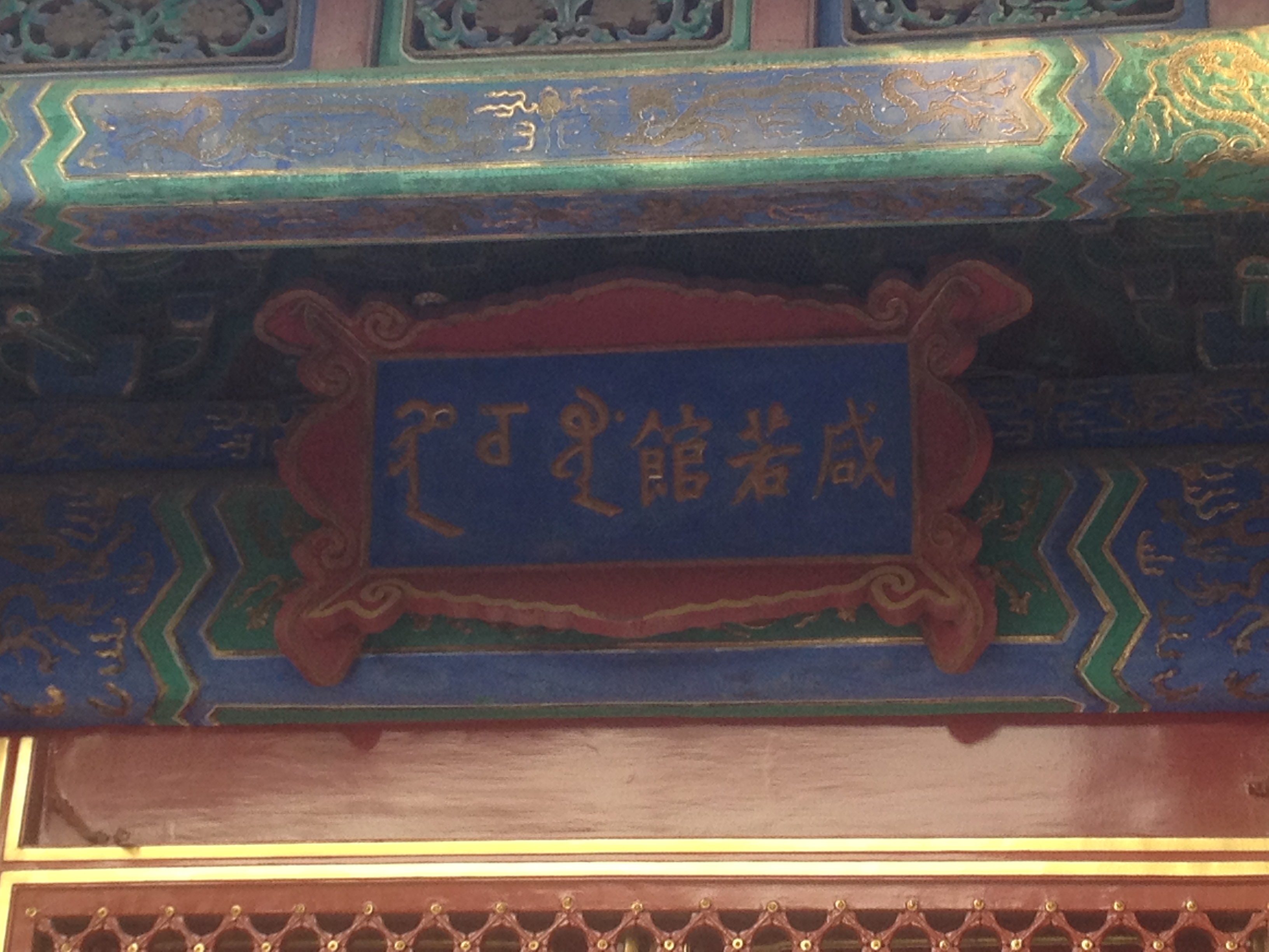 北京故宫中的咸若馆